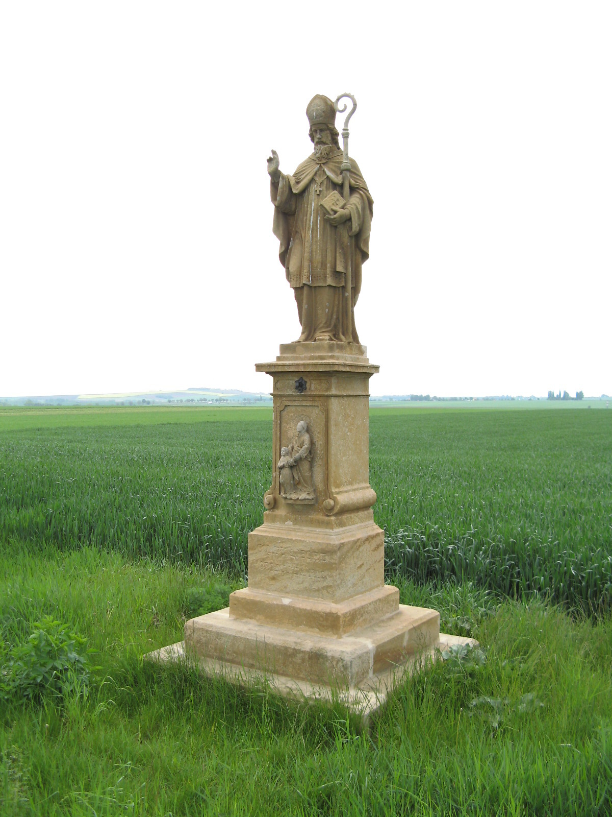 Socha sv. Libora (Určice), u silnice na Výšovice, Určice